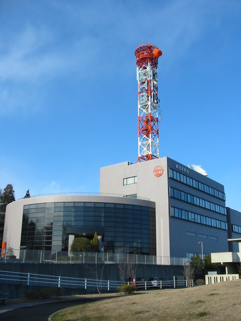 中文（台灣）: 東日本放送總部。拍攝於東日本放送總部前公園。